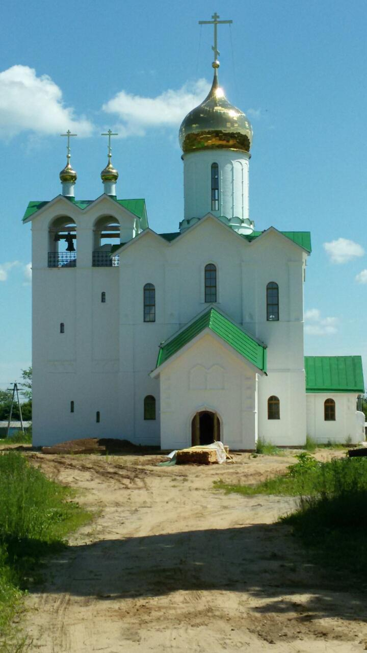 Савино Савинского района Ивановской области. Церковь Михаила Архангела. 2013--2016.